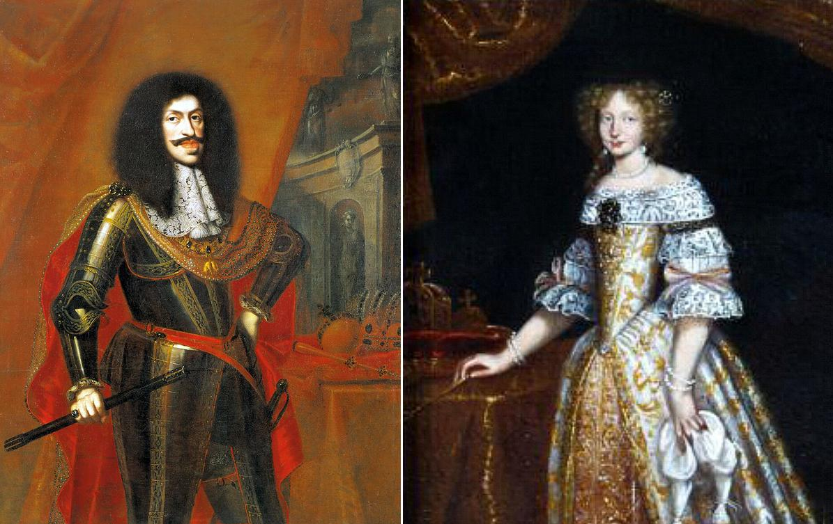 Leopoldo I d'Asburgo e Eleonora Maddalena del Palatinato-Neuburg